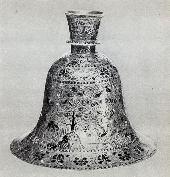 Il poggiapipe ritratto alla tavola fuori testo n. 81 de "Arte indiana" (Arnoldo Mondadori Editore, 1964) di K. Bharatha Iyer.